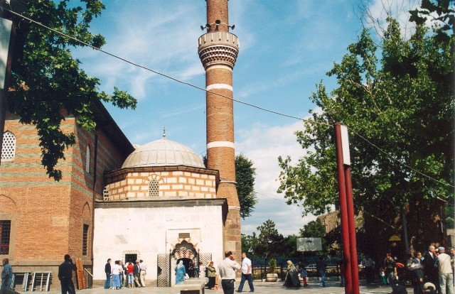 Hacıbayram1